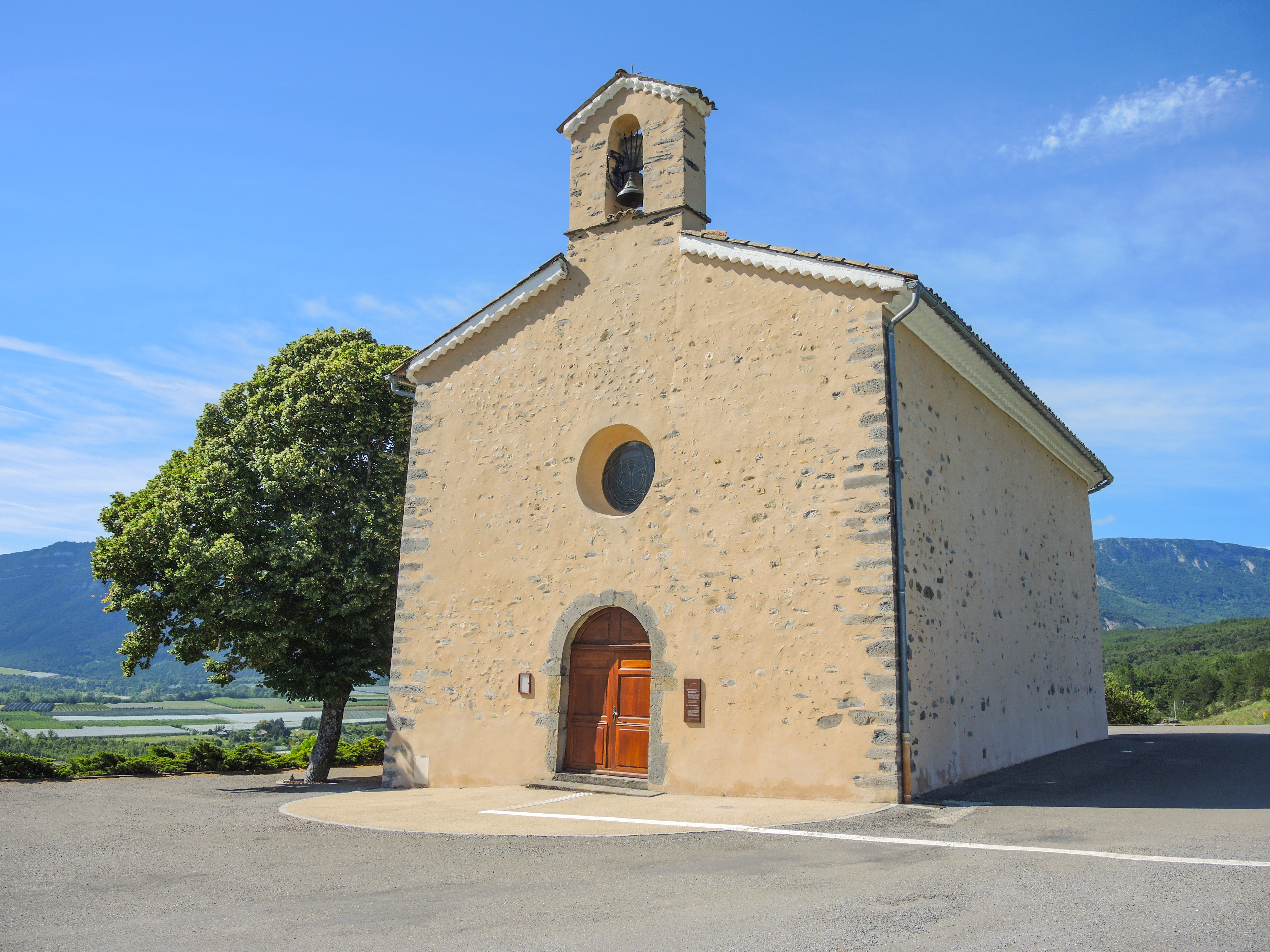 Eglise Saint-Antoine. Saléon. Hautes-Alpes